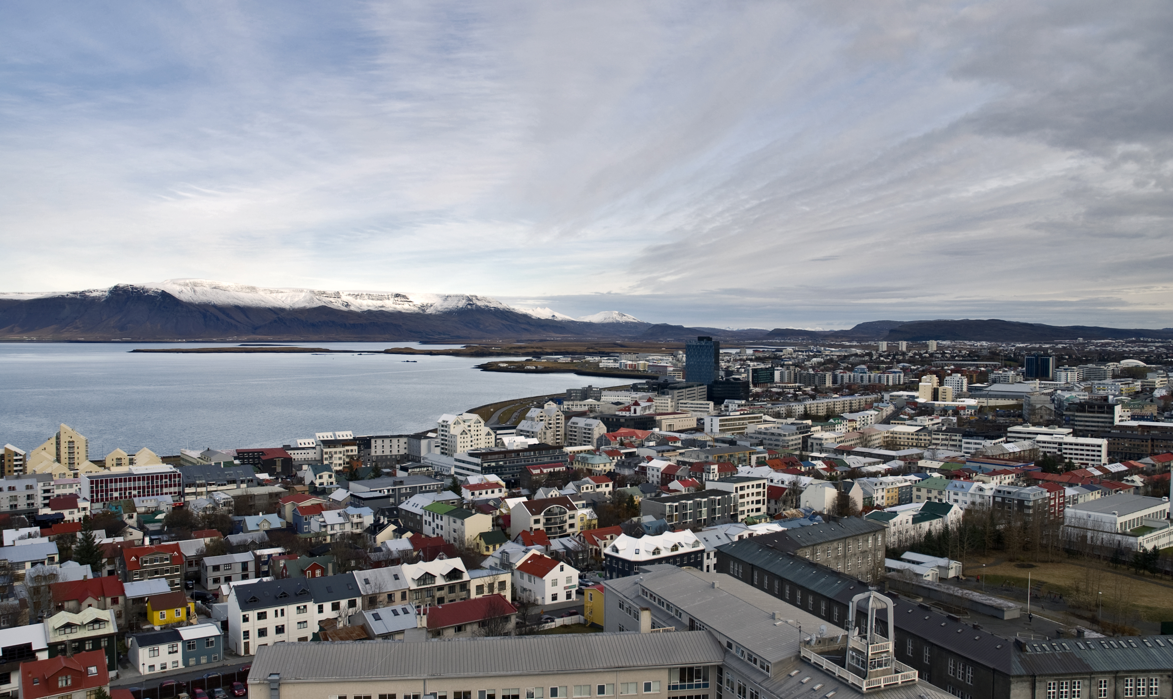 Reykjavik, Iceland